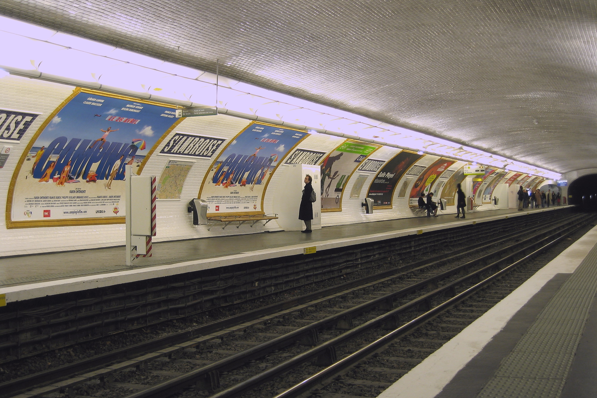 Quai direction Pont de Sèvres de la station Saint-Ambroise du métro parisien.